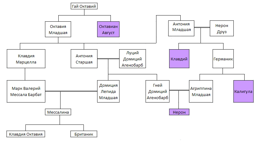 Родословная Мессалины